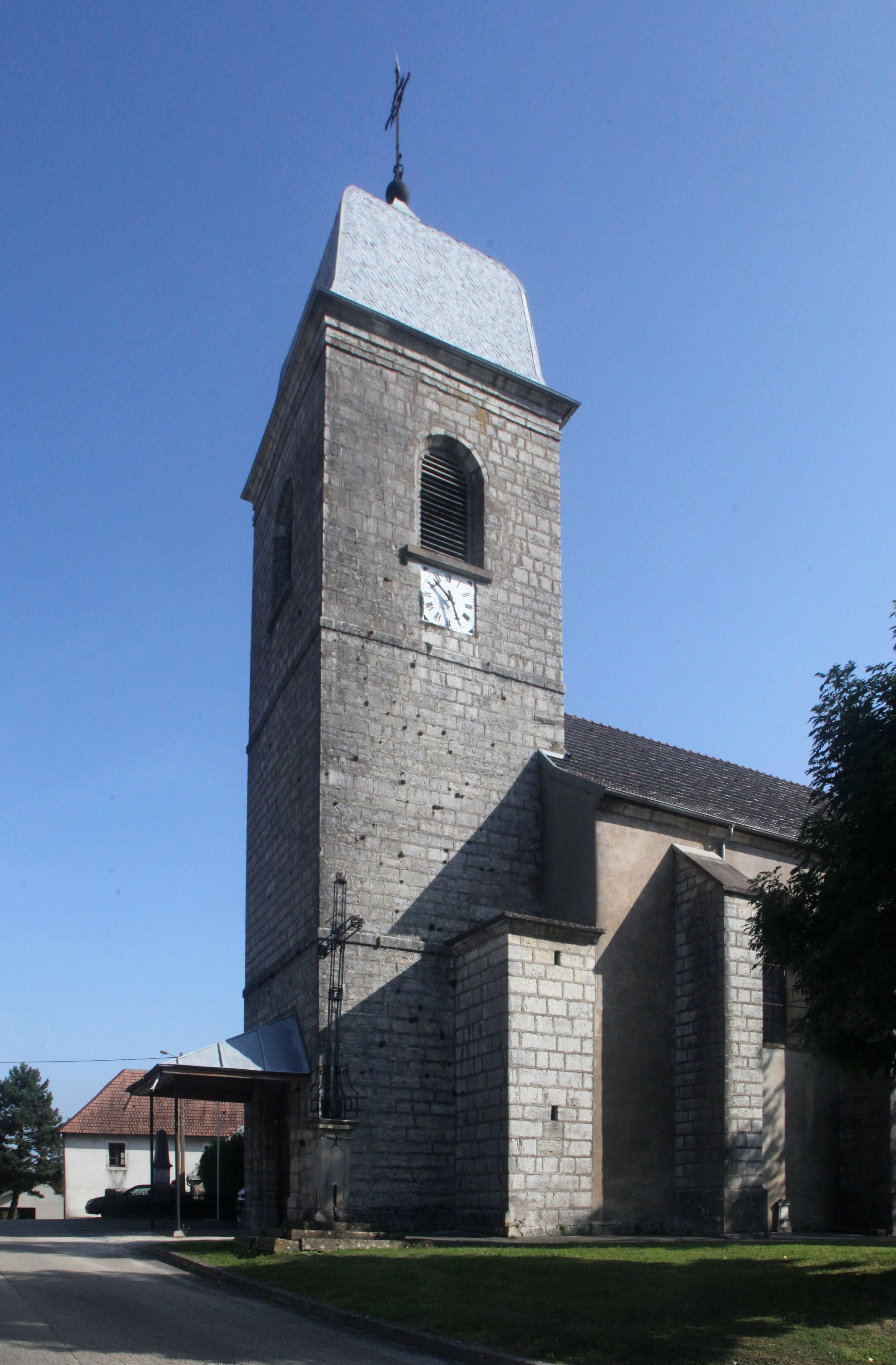 Église de Naisey-les-Granges (Doubs).